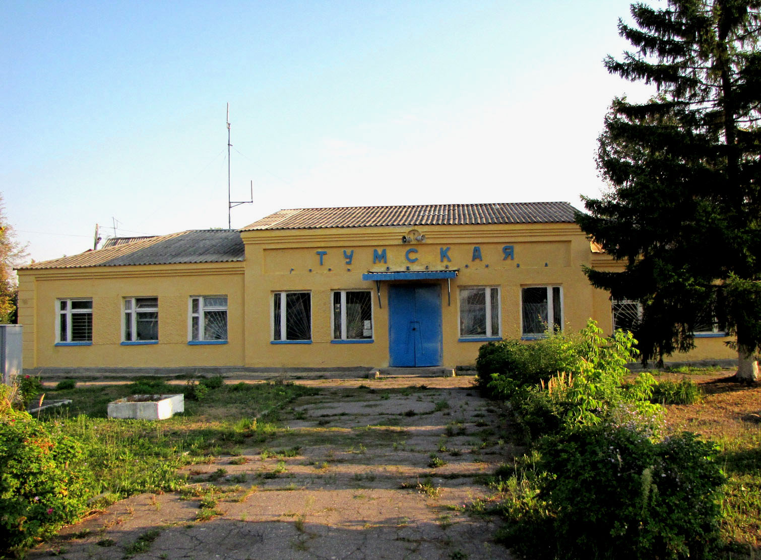 Железнодорожный вокзал в Туме